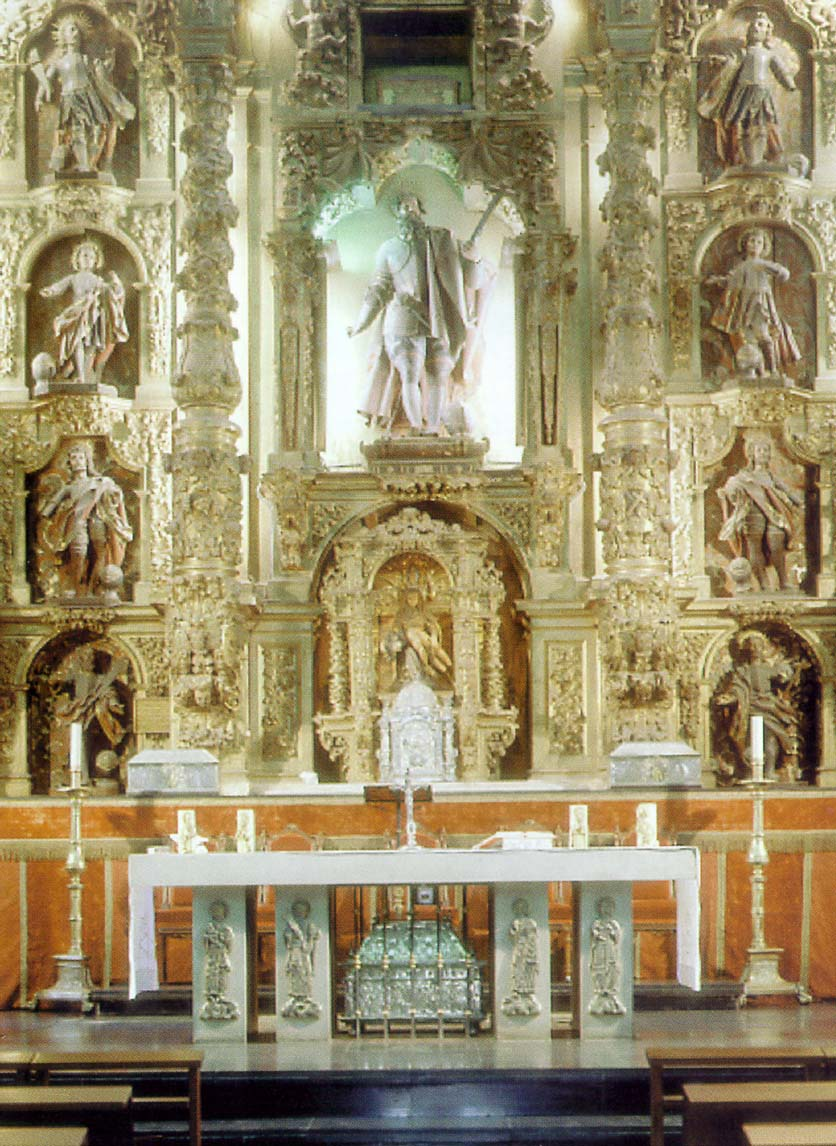 Retablo y urna de San Marcelo, iglesia de S. Marcelo (León)